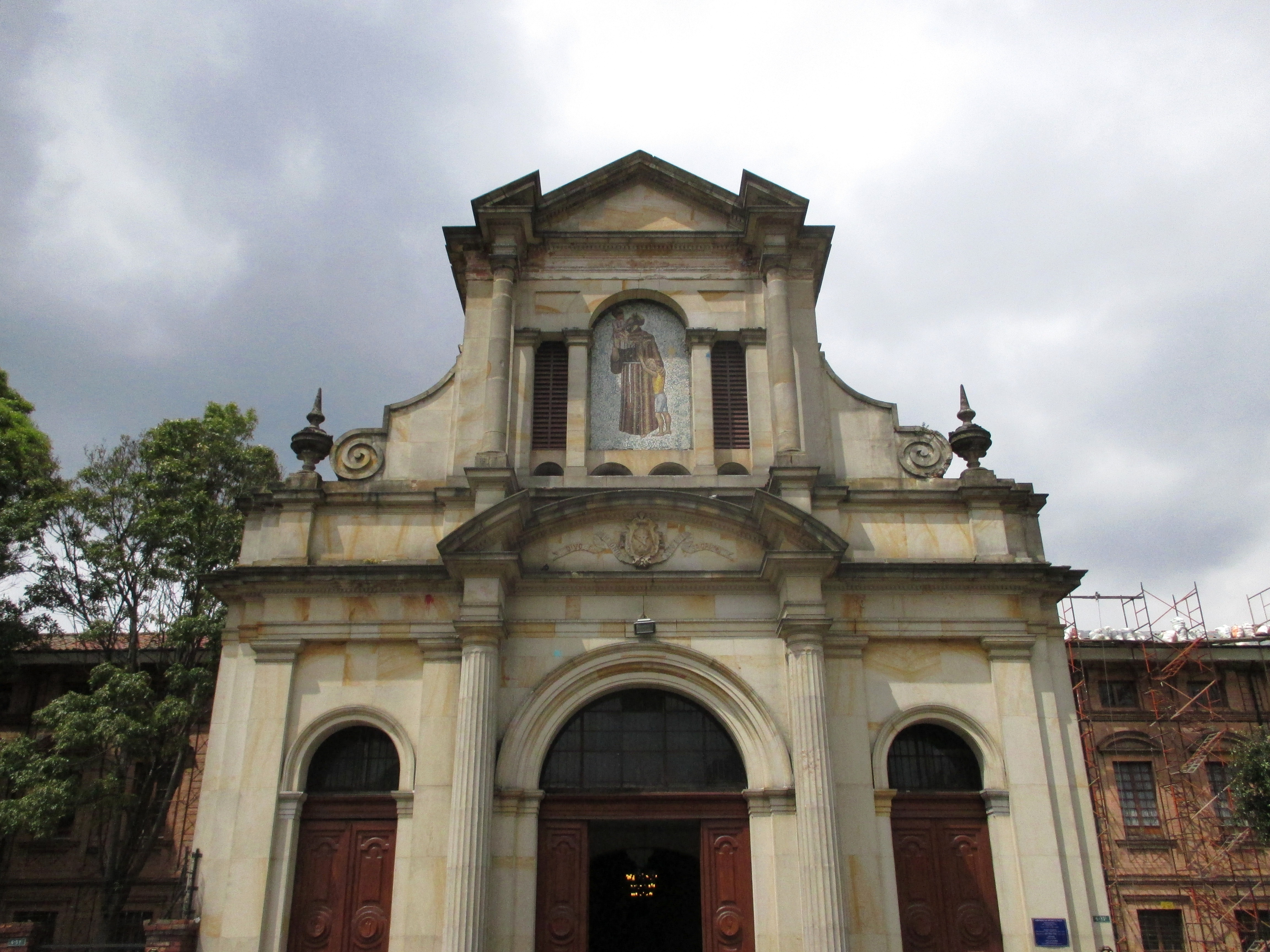 Bogotá